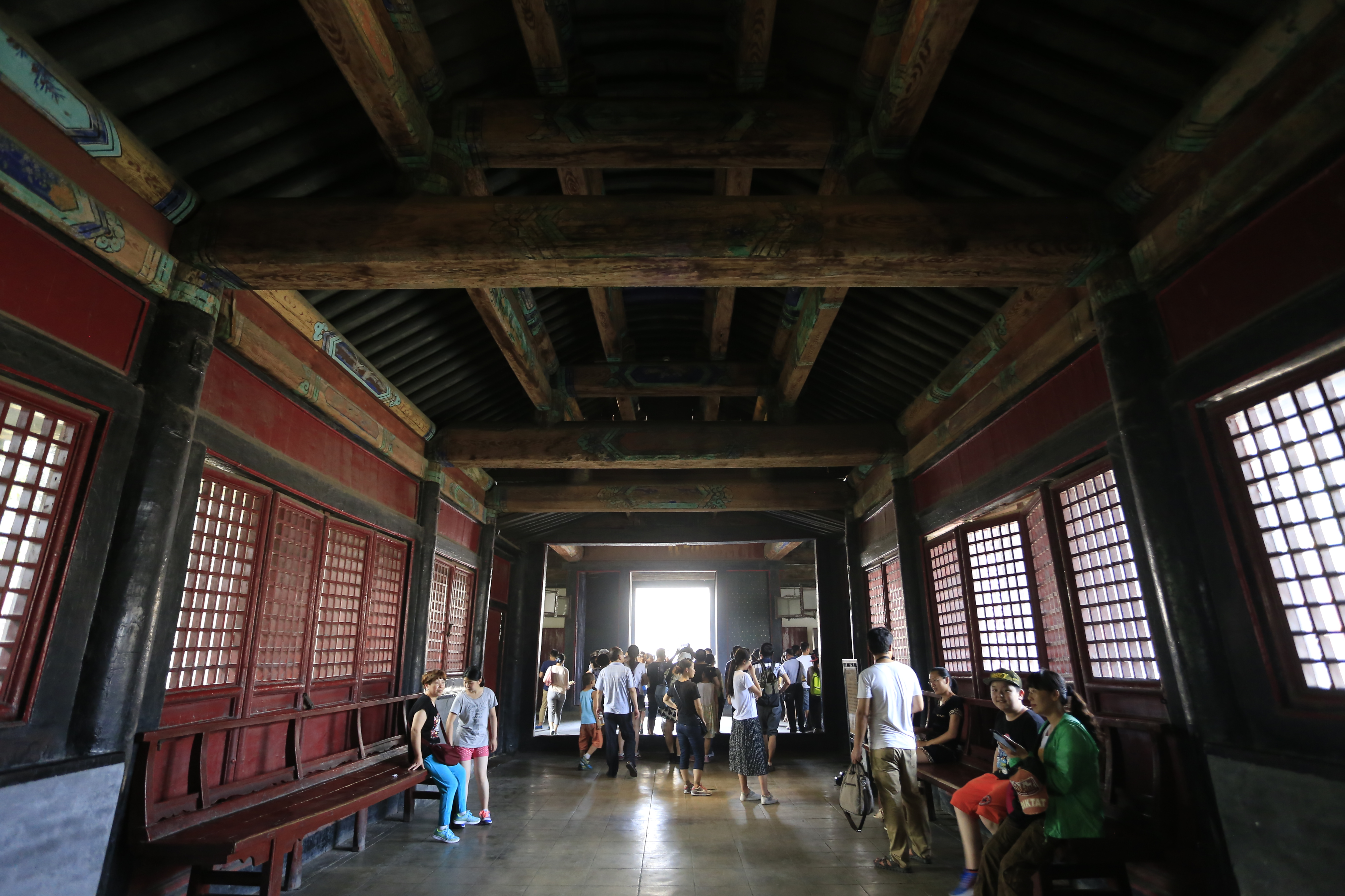 曲阜孔府—— 穿廊